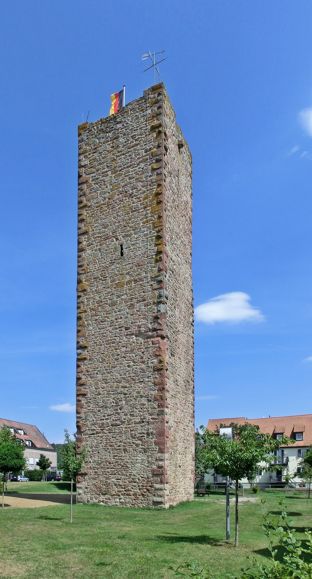 Der Steinerne Turm in Hardheim, Baden-Württemberg.